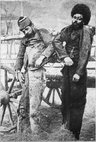 Изложените в Малко Търново мъртви тела на Пано Ангелов (вляво) и Никола Равашола